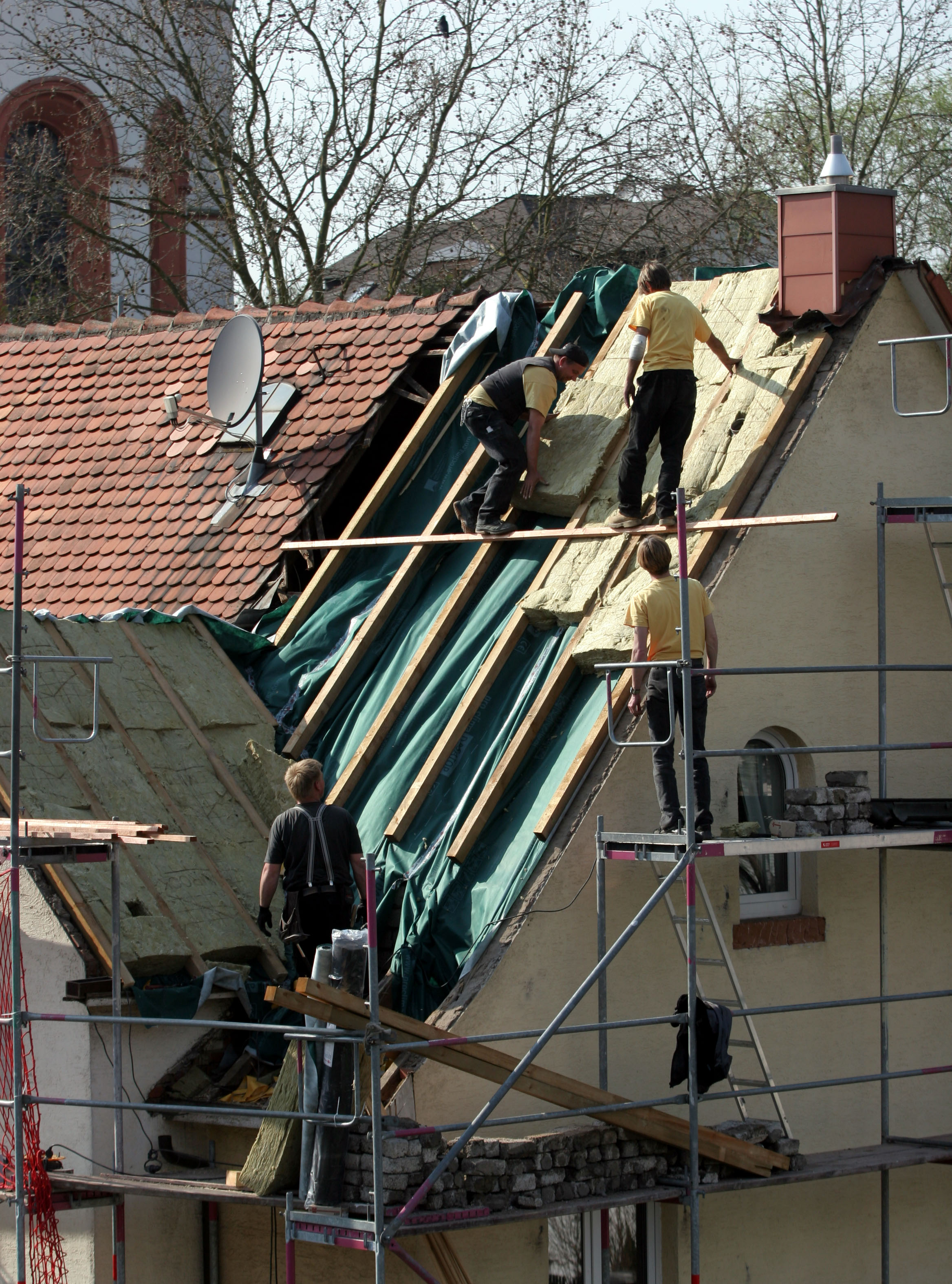 Zimmermänner beim Verlegen von Steinwollematten zur Dachisolierung an einem Altbau.